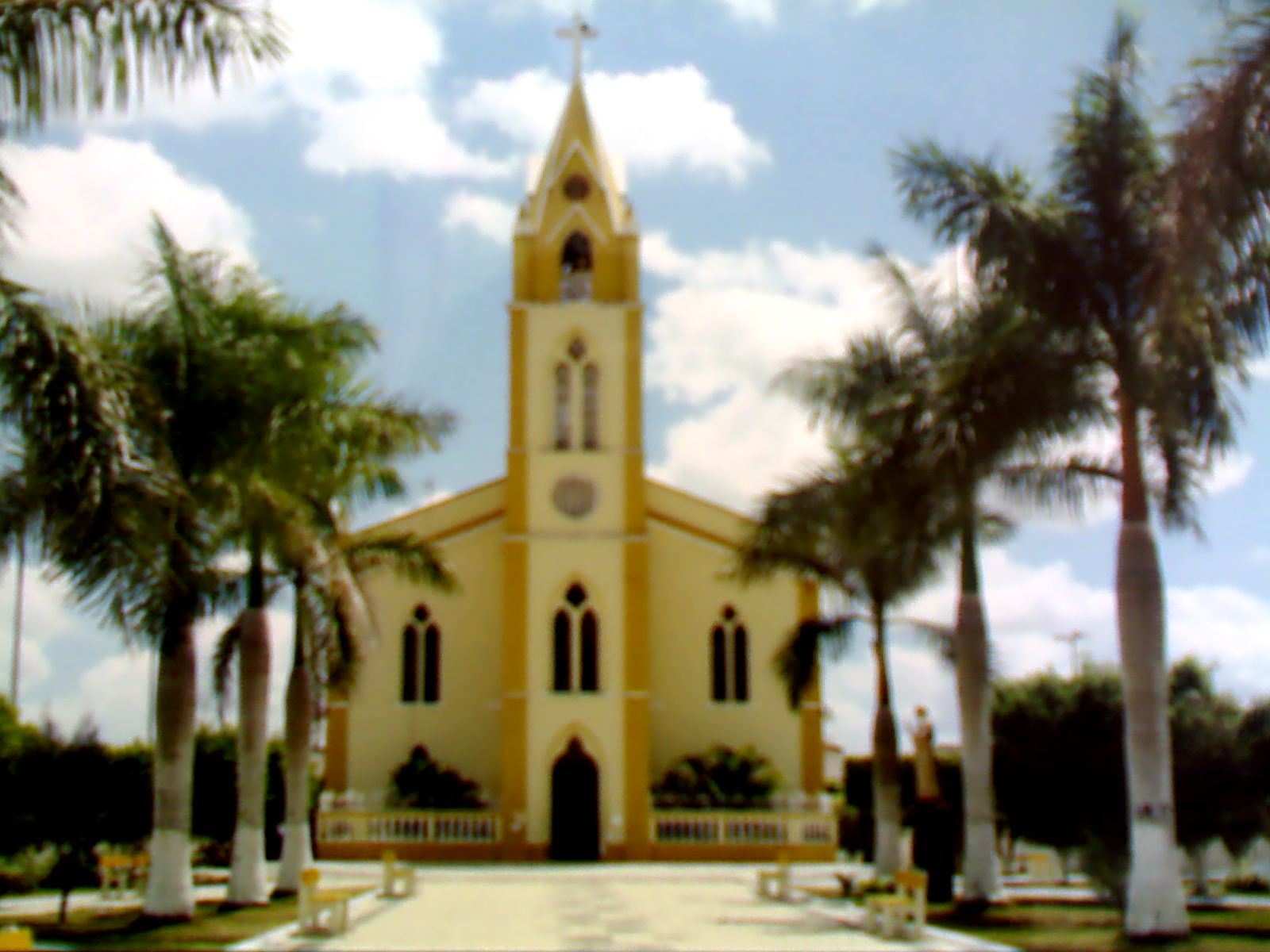 PRAÇA SÃO PAULO, IGREJA MATRIZ DE FREI PAULO